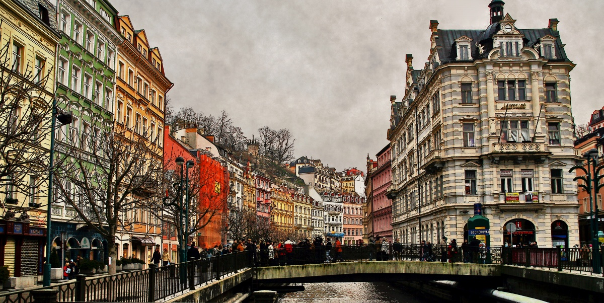 carlovy vary